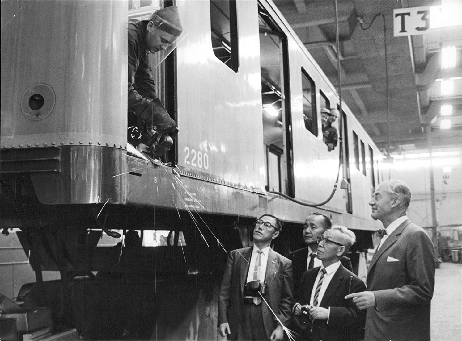 Tekniske direktören Olof Kekonius med japanska gäster i SS-hallen i Blåsut 1962.